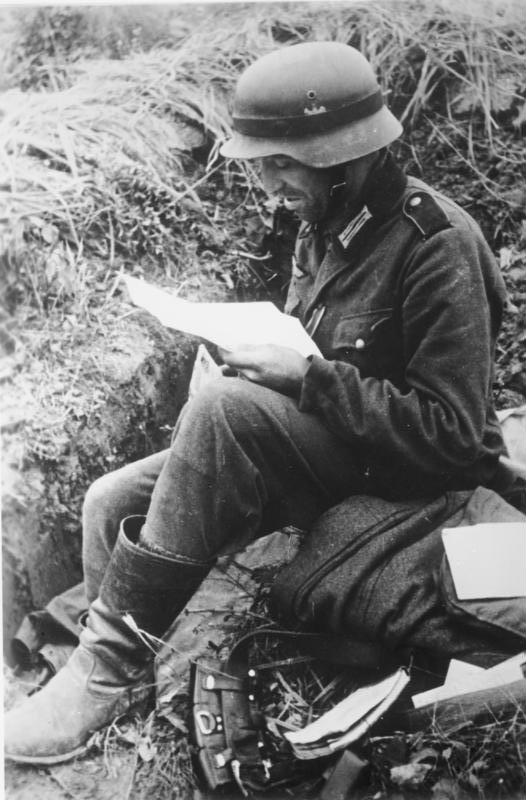 An der Sowjetfront: Im Kampfabschnitt südlich des Terek. Der Brief aus der Heimatl. PK-Aufnahme: Kriegsberichter Schütze 5852-42 "Fr.Fr.OKW" Oktober 1942